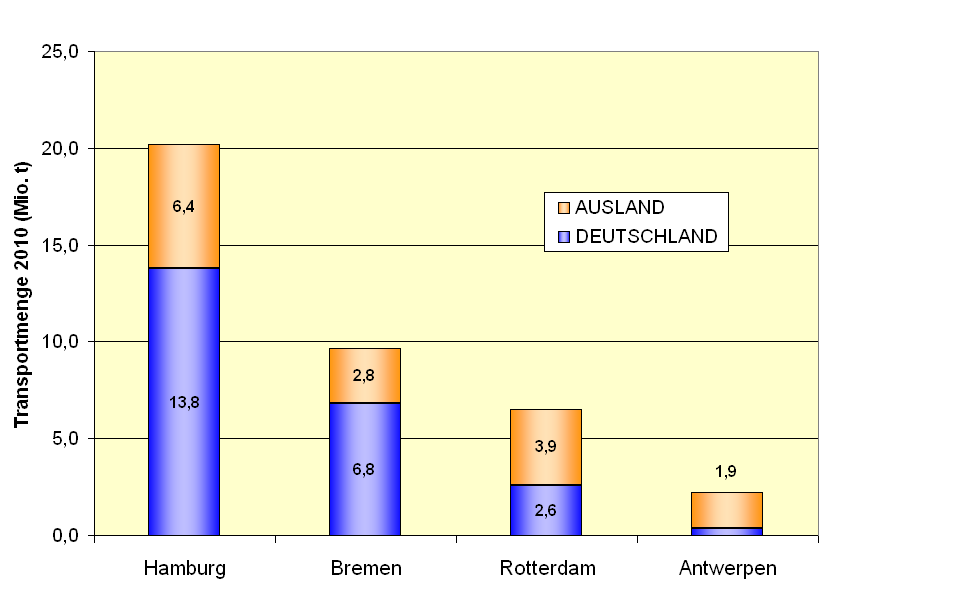 Seehafenhinterlandverkehr auf der Schiene in Deutschland 2010 zu den 4 wichtigsten Häfen, Quelle: Stat. Bundesamt, Genesis-online Bereich 46 Verkehr